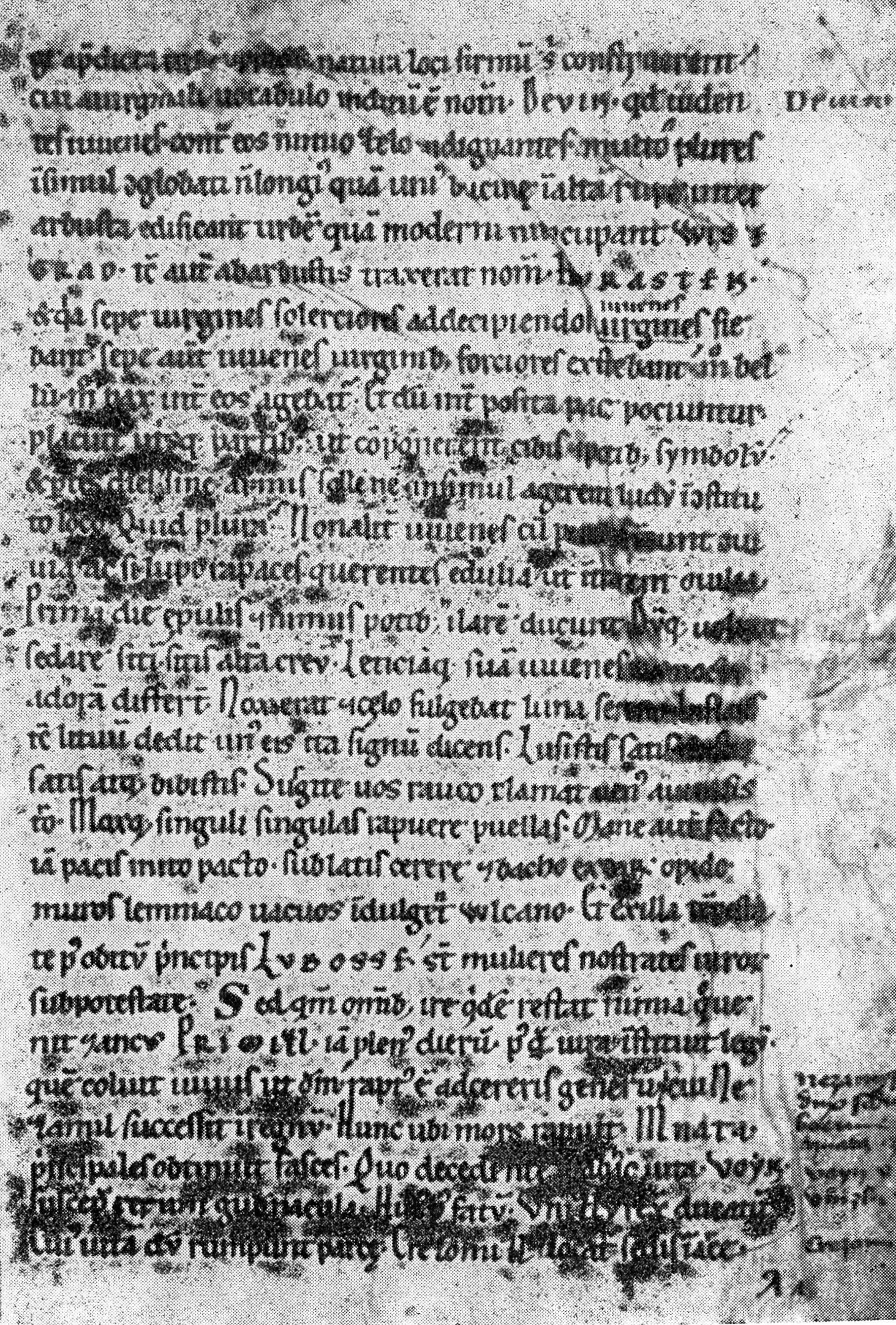 Cosmas: Chronica Boemorum (Budyšínský rukopis Kosmovy Kroniky Čechů)